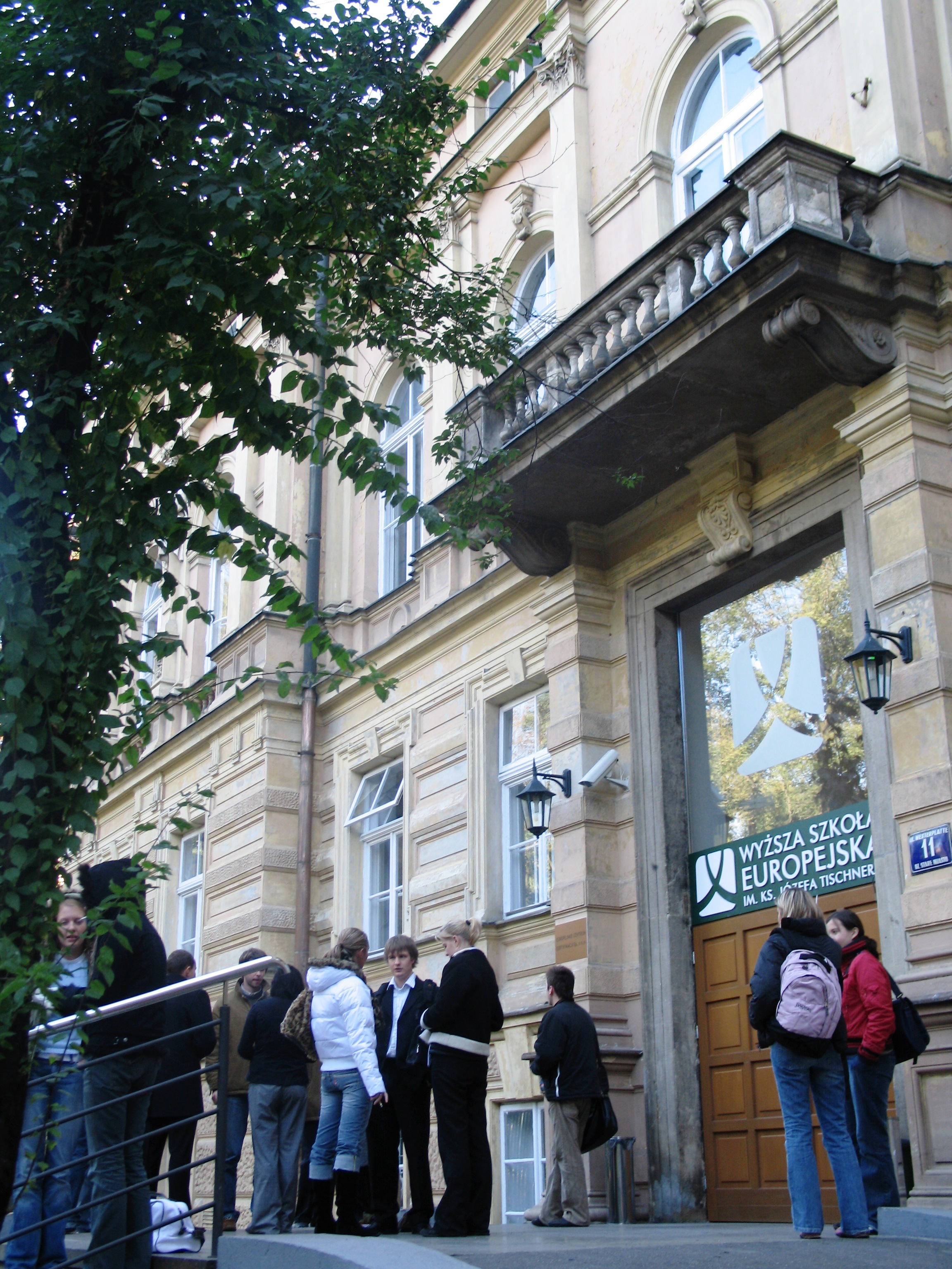 Główny budynek Wyższej Szkoły Europejskiej